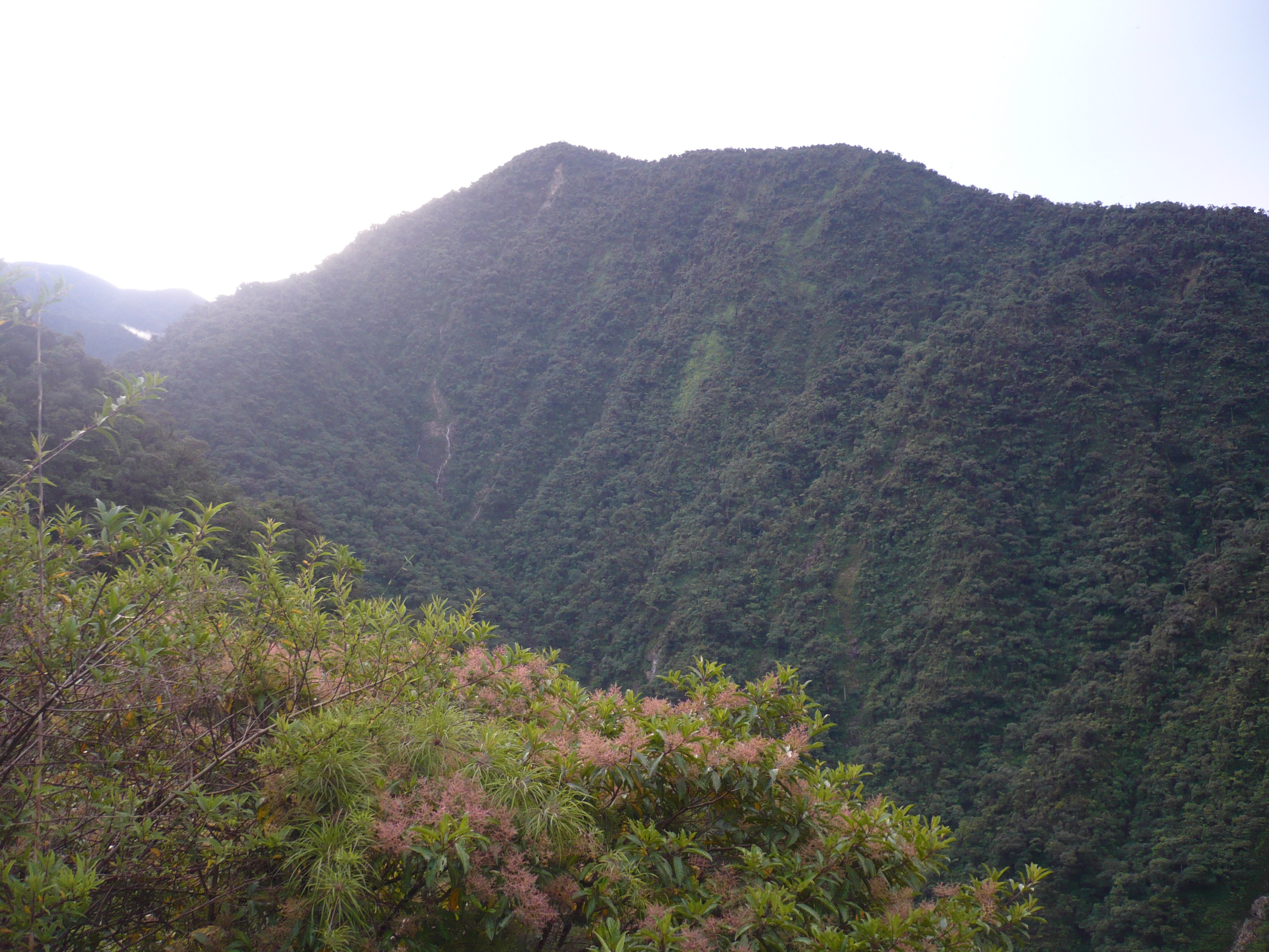 Valle de Kosñipata, Parque Nacional del Manu